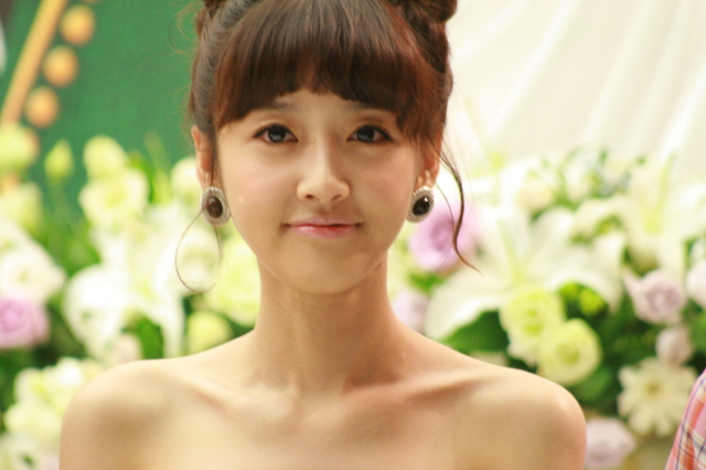 2010년 6월 15일 서울 대치동에 위치한 컨벤션 마벨러스에서 열린 KBS 주말드라마 《결혼해주세요》 제작발표회에 참석한 이다인.